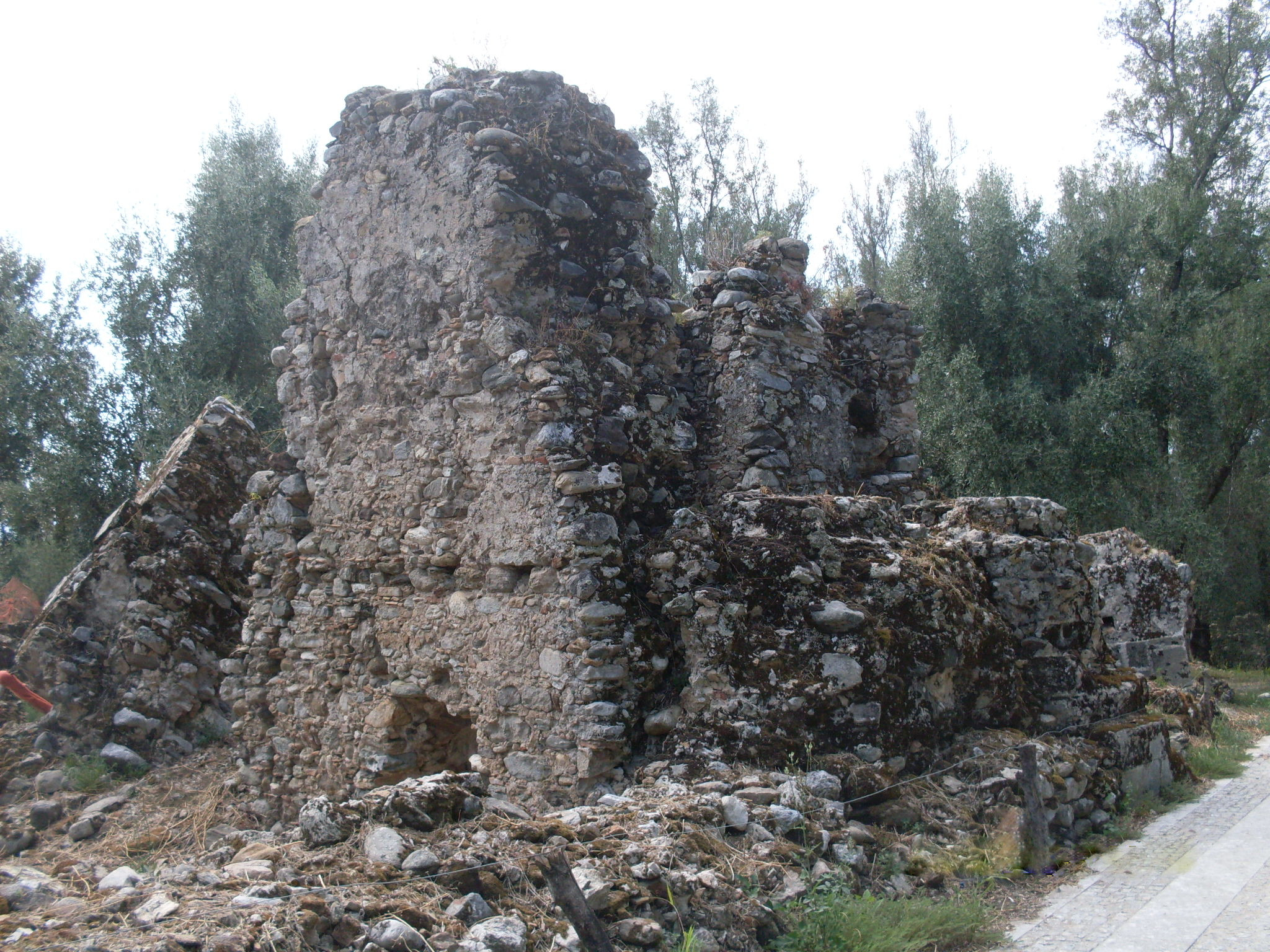 Campanile della Cattedrale, ruderi posti lungo l'asse principale della città medievale.